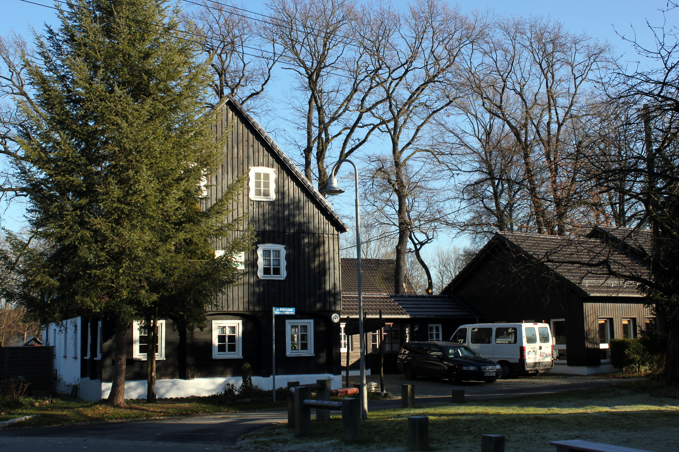 Hornjoserbsce: W lěće 1927 natwarjena lěsna młodownja w Połpicy (gmejna Malešecy).